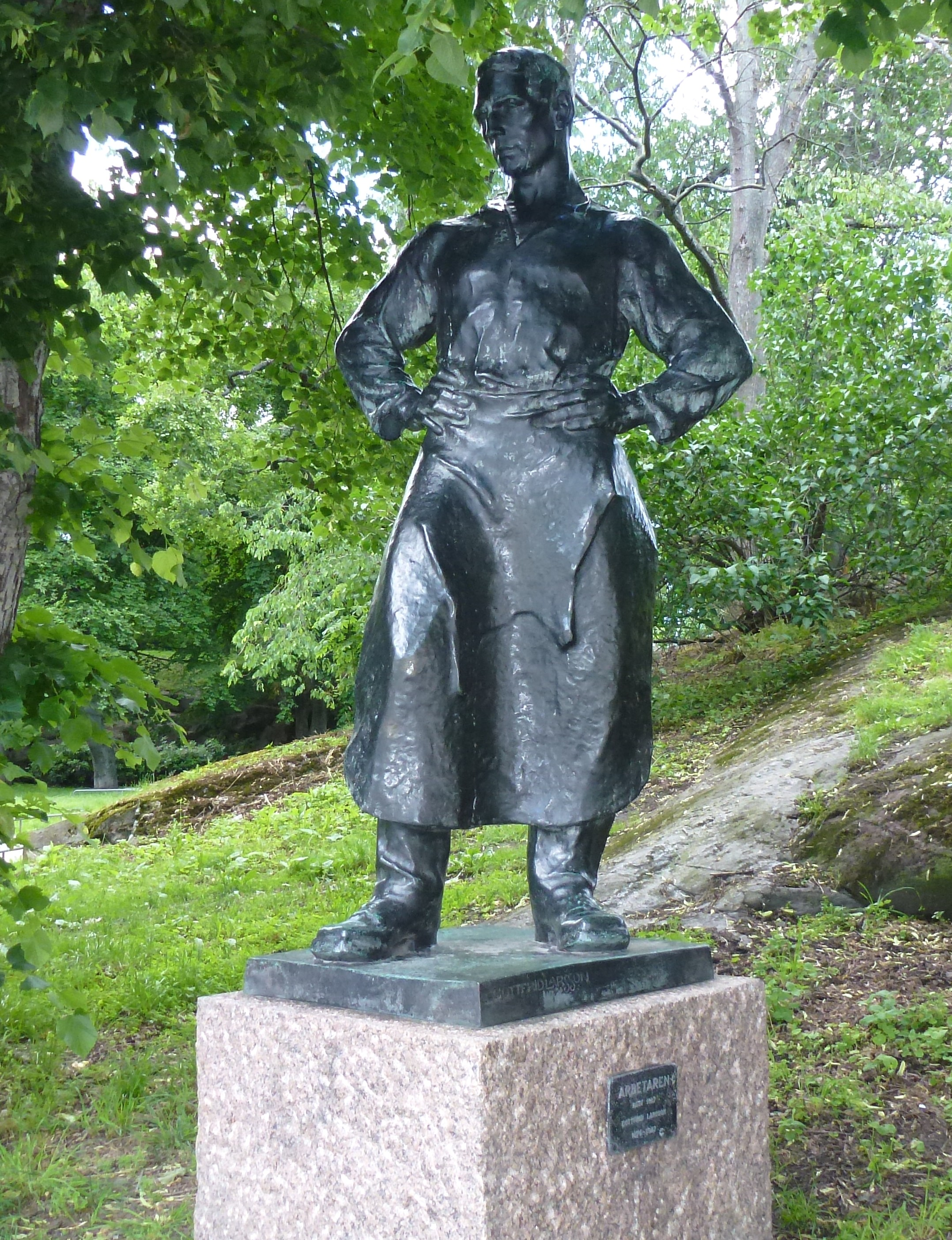 "Arbetaren" (1917), utförd av Gottfrid Larsson (1875-1947). En gåva av Föreningen för Stockholms prydande av konstverk.